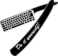 Internetzelfmoord